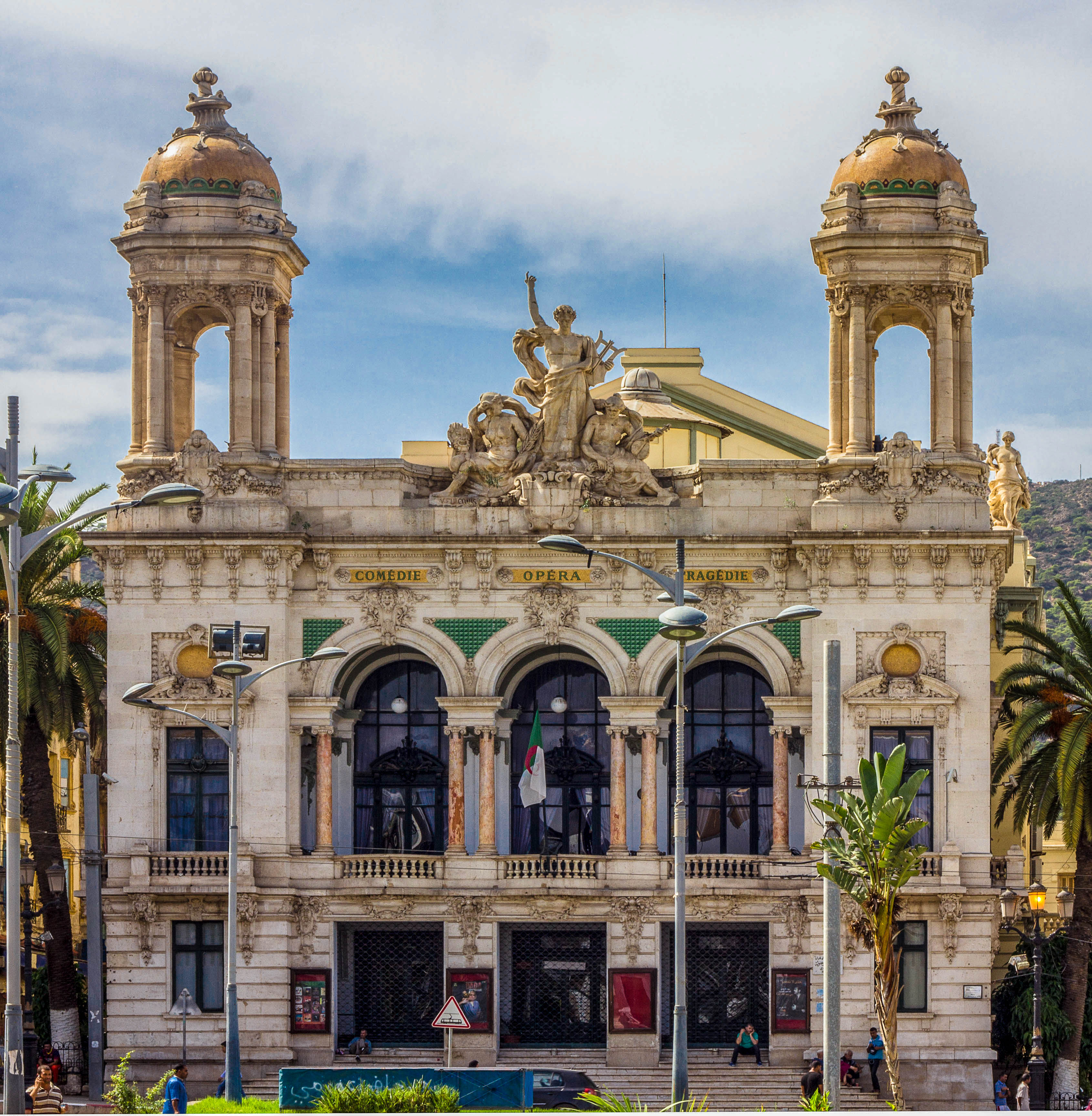 théâtre d'Oran Abdelkadder Alloula